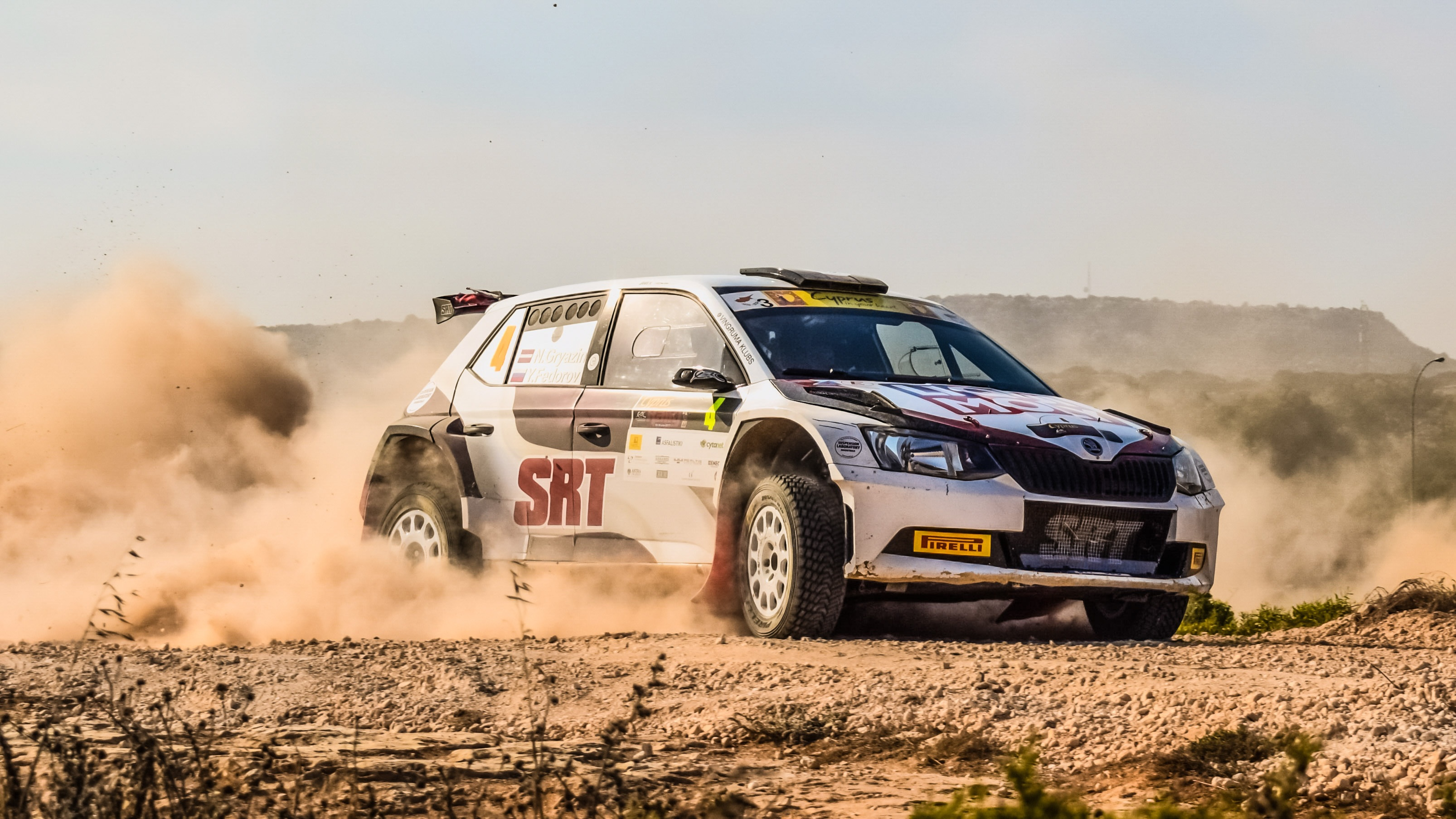 Rosyjski kierowca Nikolay Gryazin podczas Rajdu Cypru w roku 2017